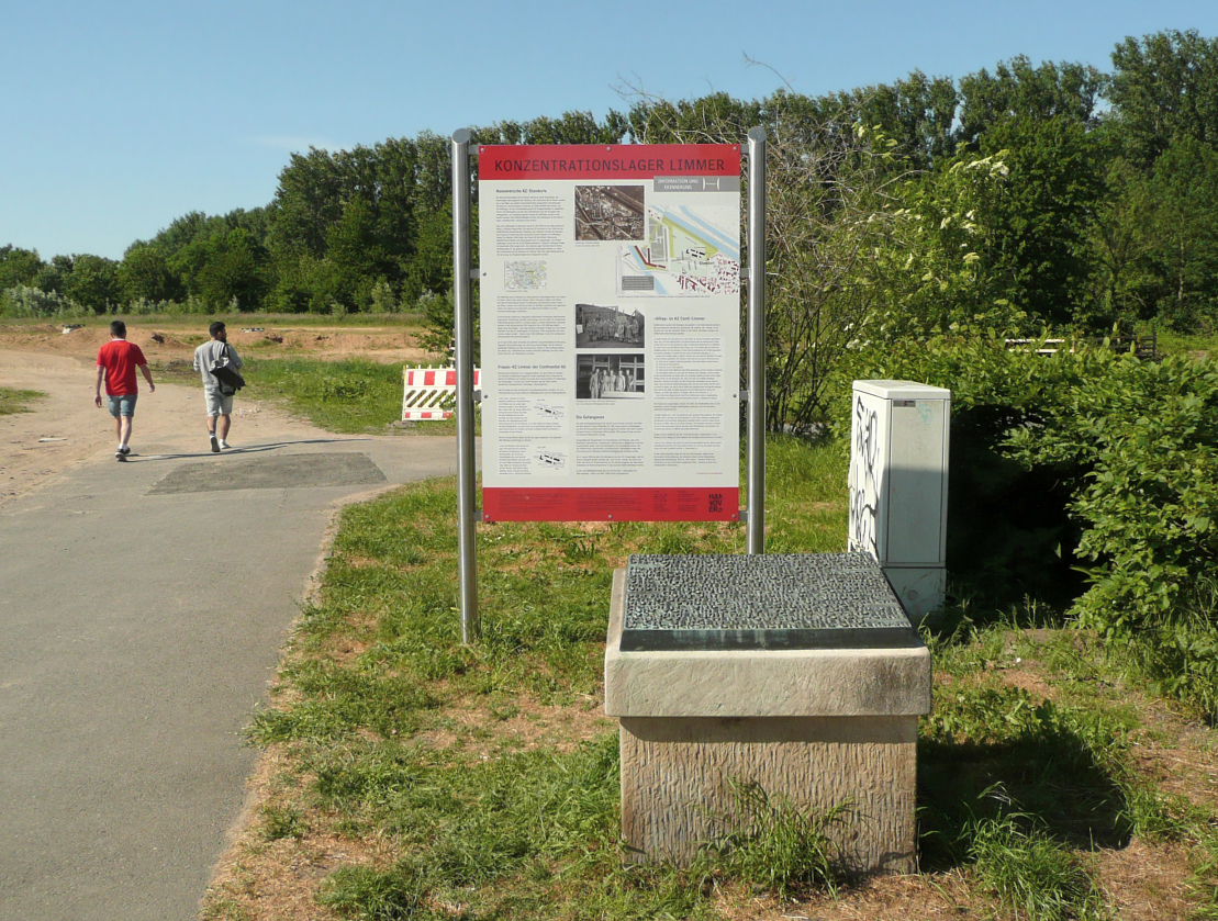 Gedenkstein Informationstafel zum KZ-Außenlager Hannover-Limmer